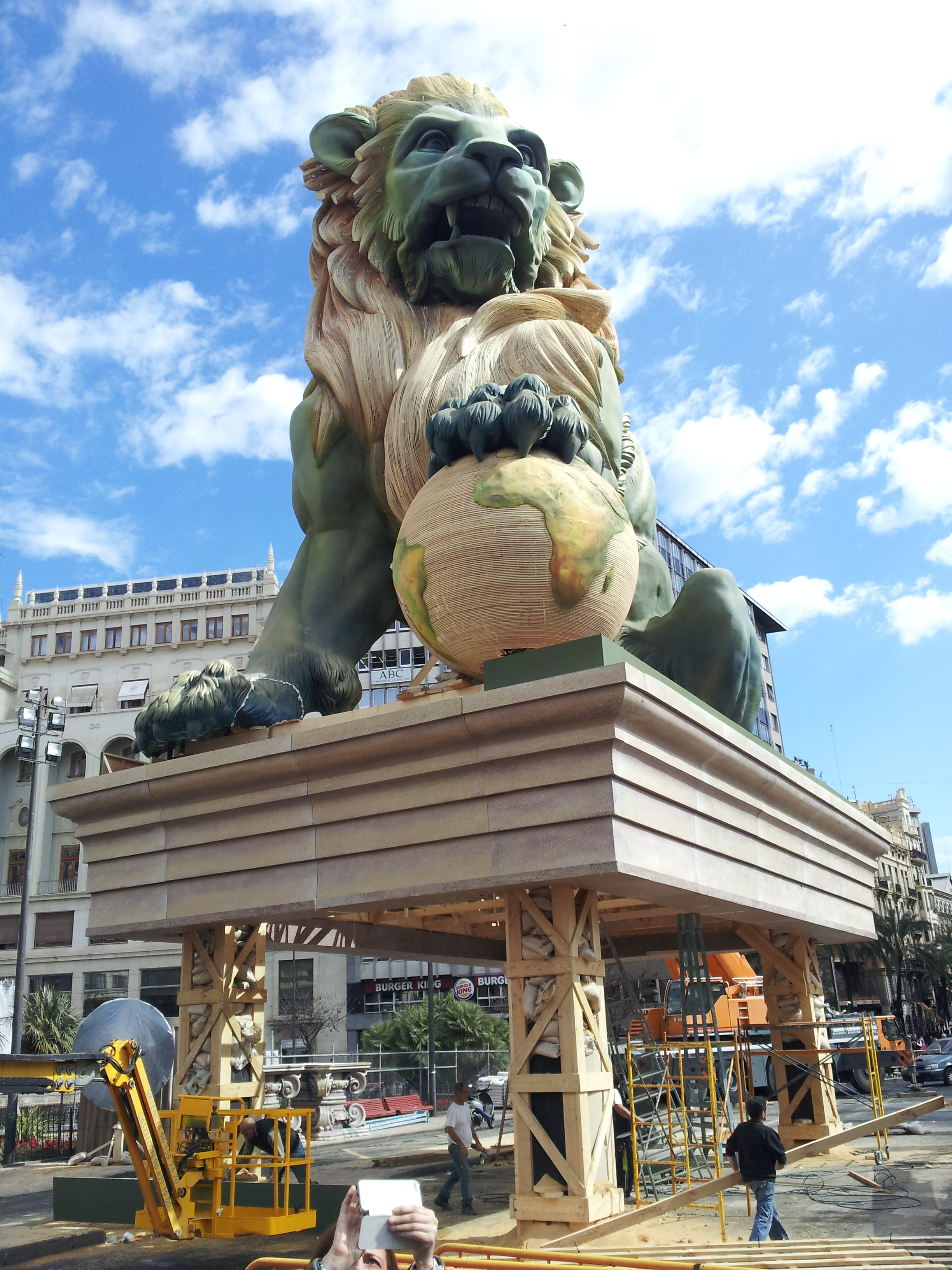 Imatges de la plantà